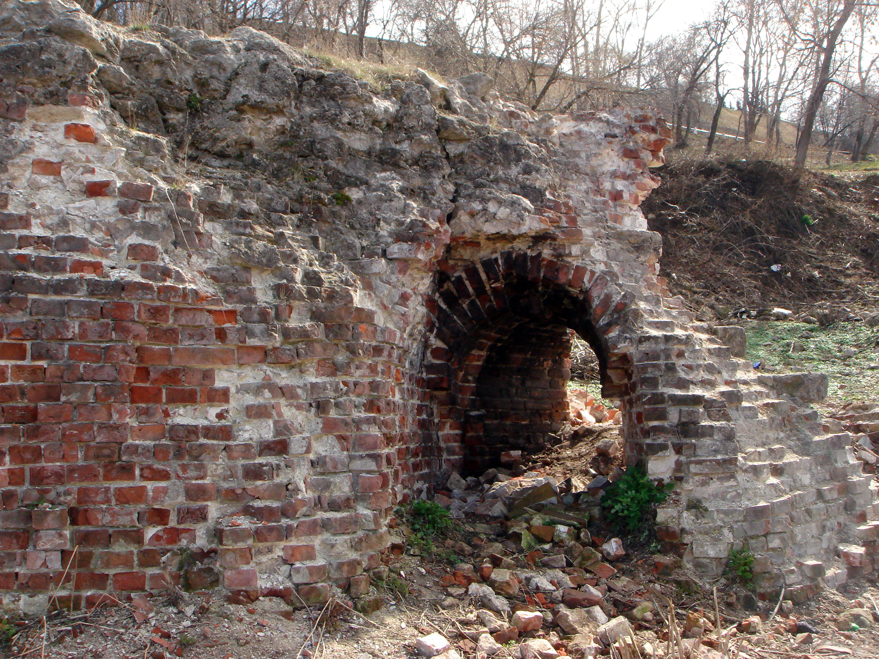 Руины Зачатской башни Нижегородского Кремля